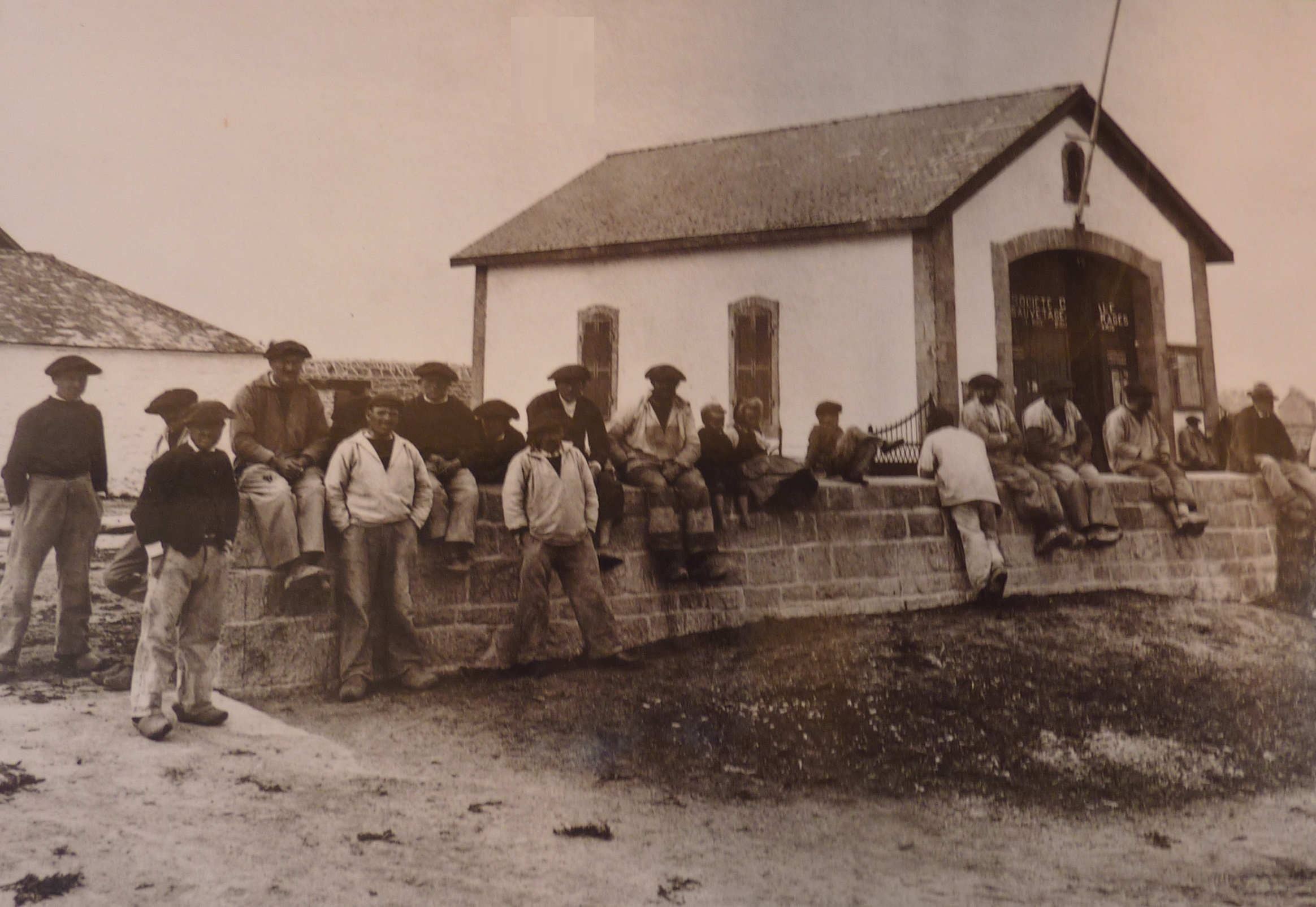 Penmarch : marins de Kérity devant l'abri du canot de sauvetage vers 1910